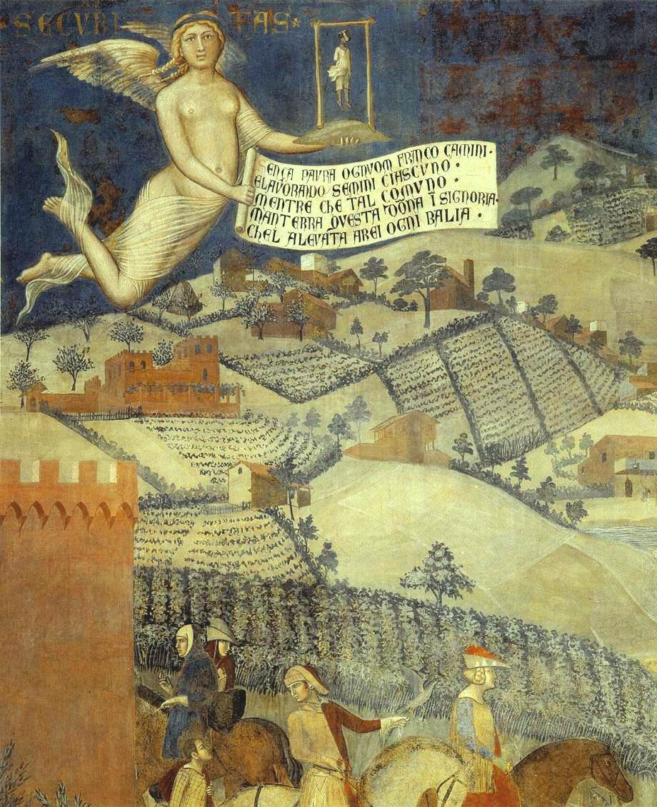 The Effects of Good Government in the Countryside (detail), part of the Good and Bad Government series. Palazzo Pubblico, Siena.